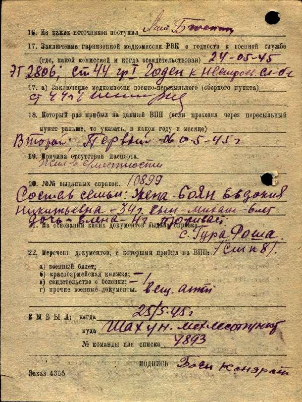 Kozatske_Boian_1.jpeg